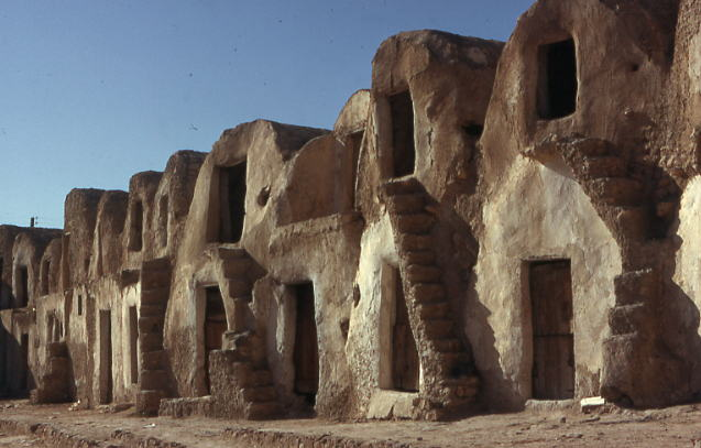 Ghorfas, Medenine, Tunisie